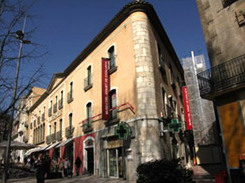 Museu del Joguet de Catalunya, a Figueres. 圖片來源：Toys from Spain